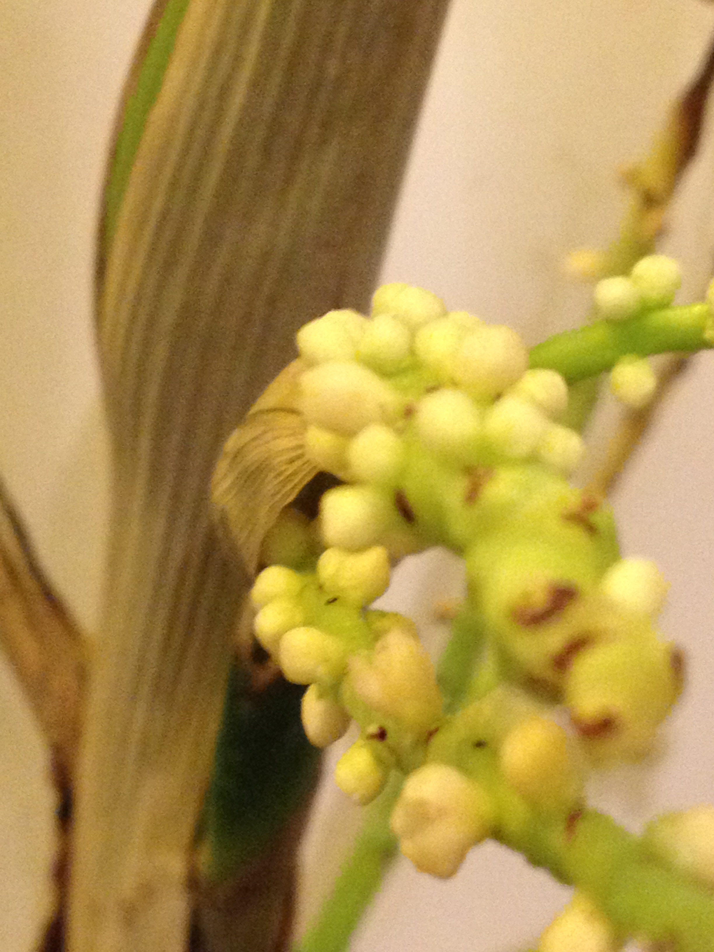 Chamaedorea microspadix - libération de l'inflorescence